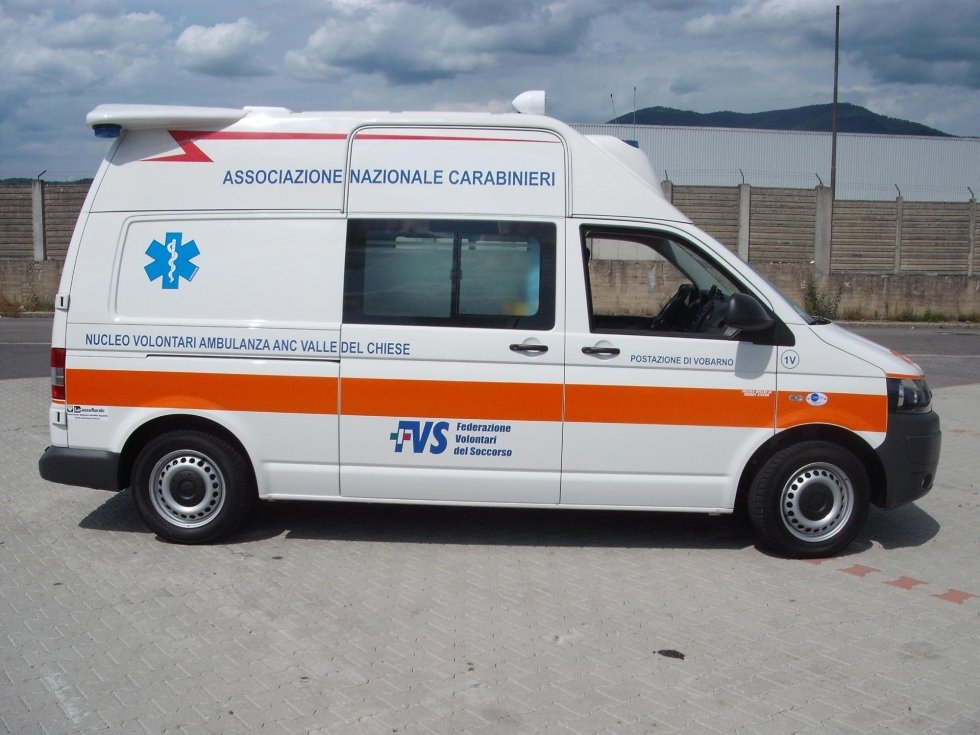 Ambulanza da soccorso usata dall'Associazione Nazionale Carabinieri